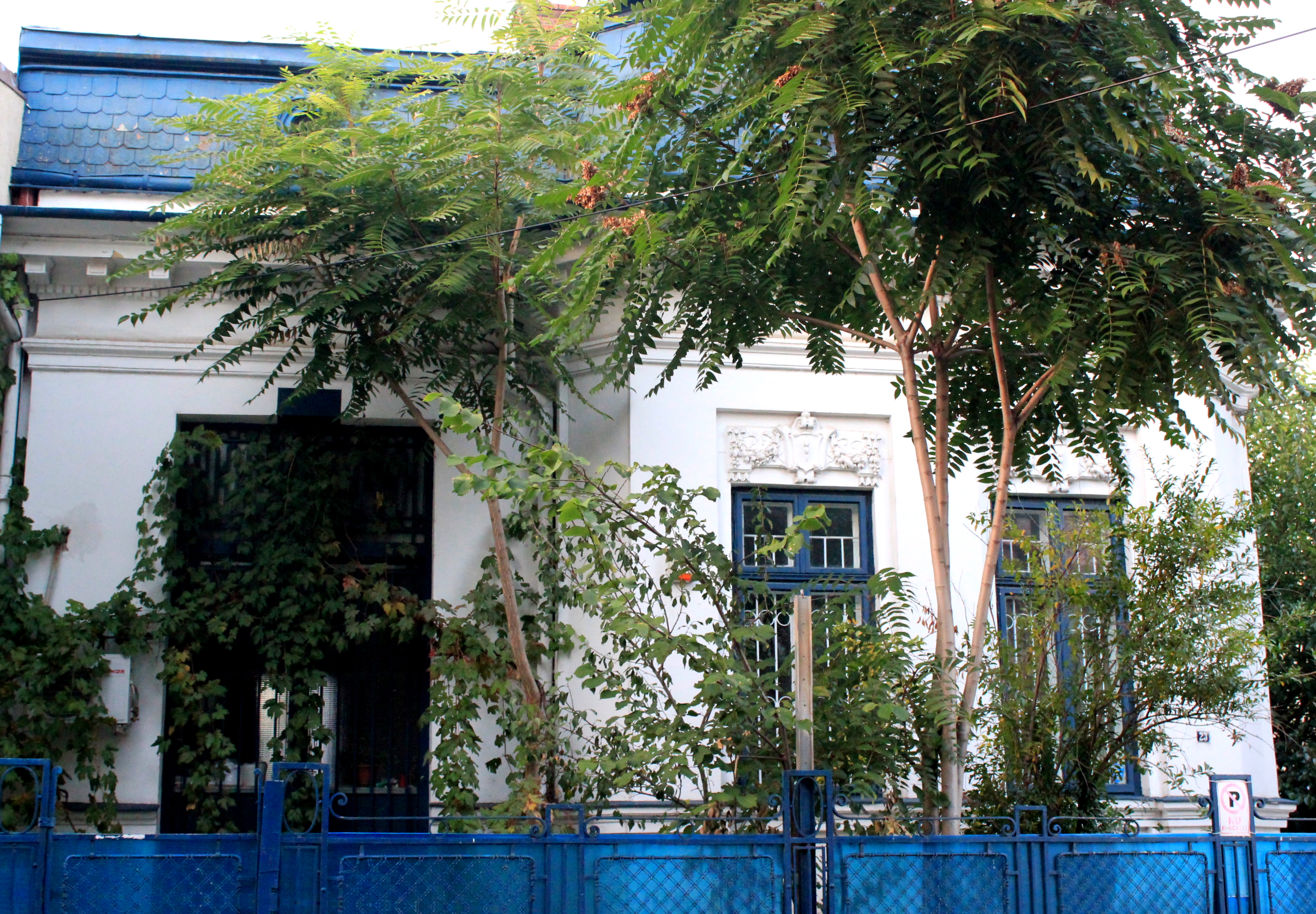 Casă Georgescu Mihail 23